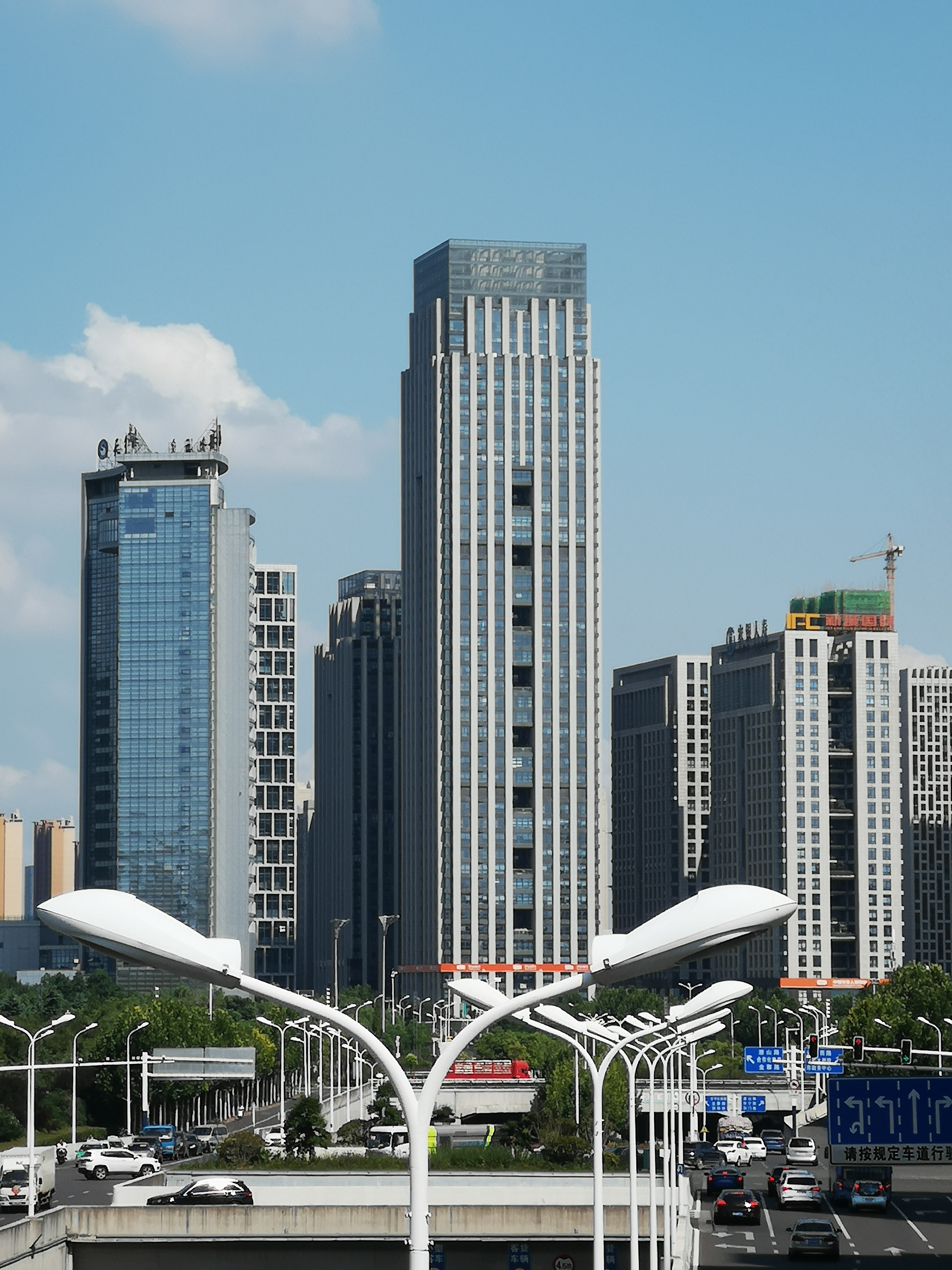 中文（中国大陆）: 合肥新城中心